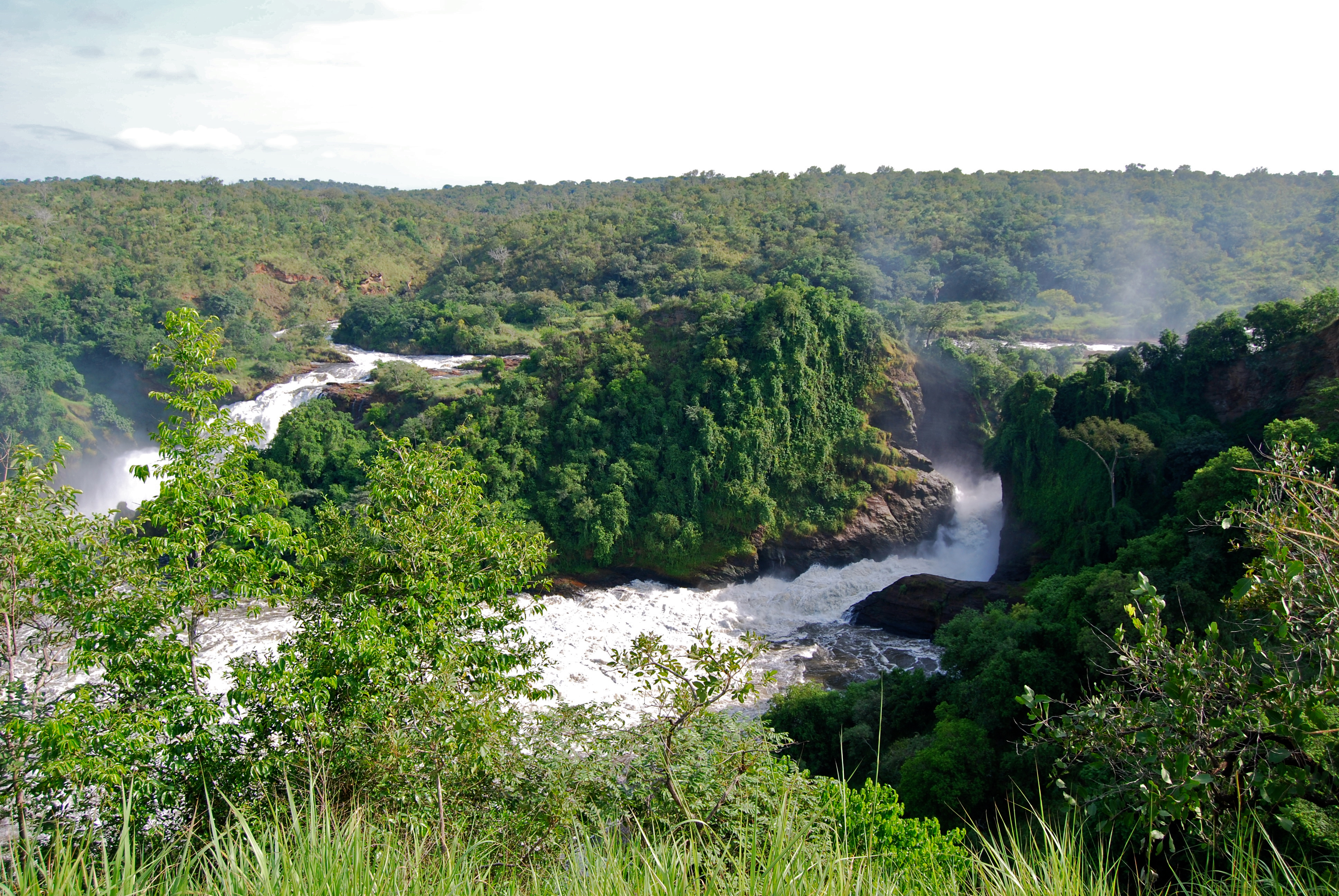 Murchison Falls NP, UGANDA